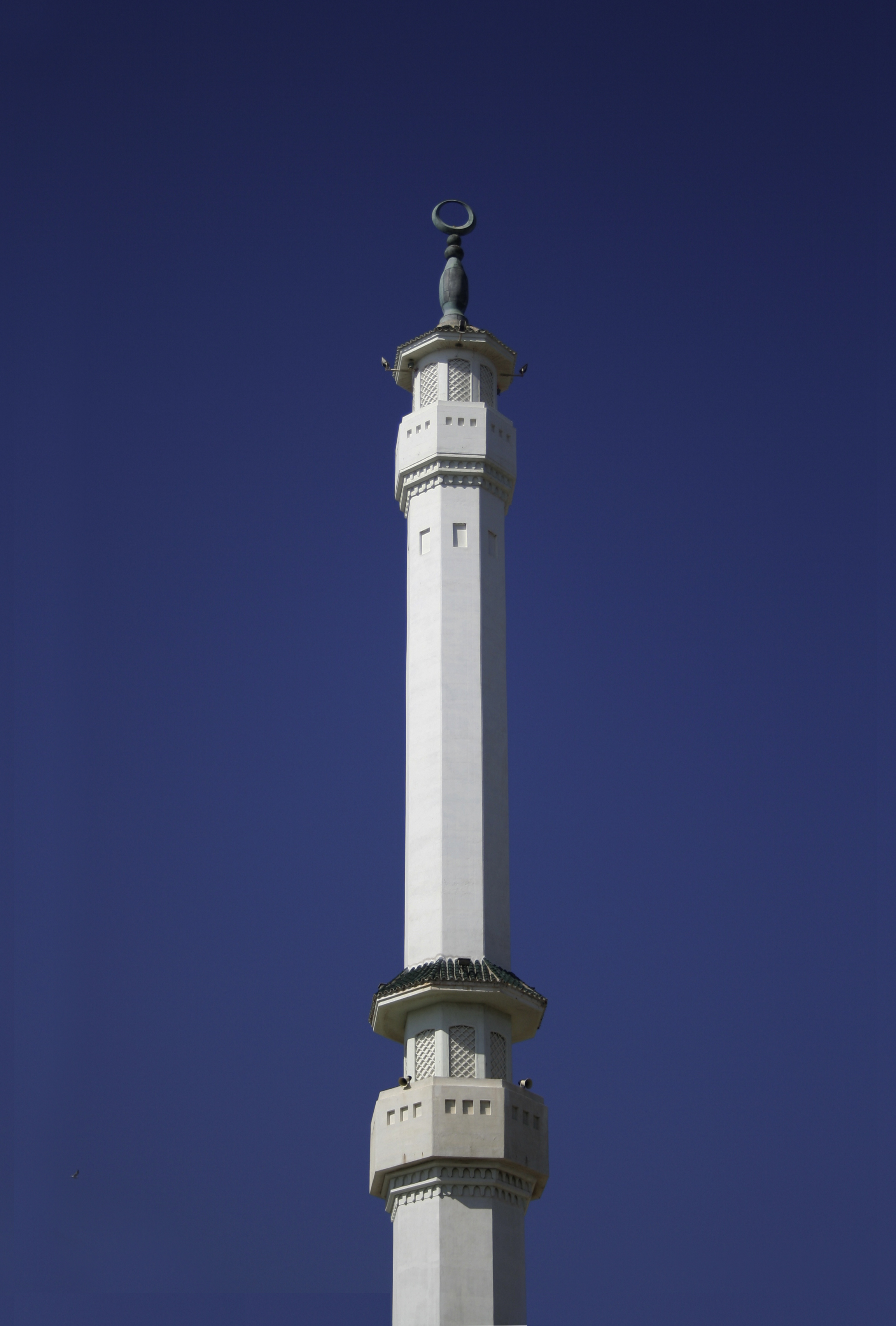 Gibraltar mosque tower over deep blue sky